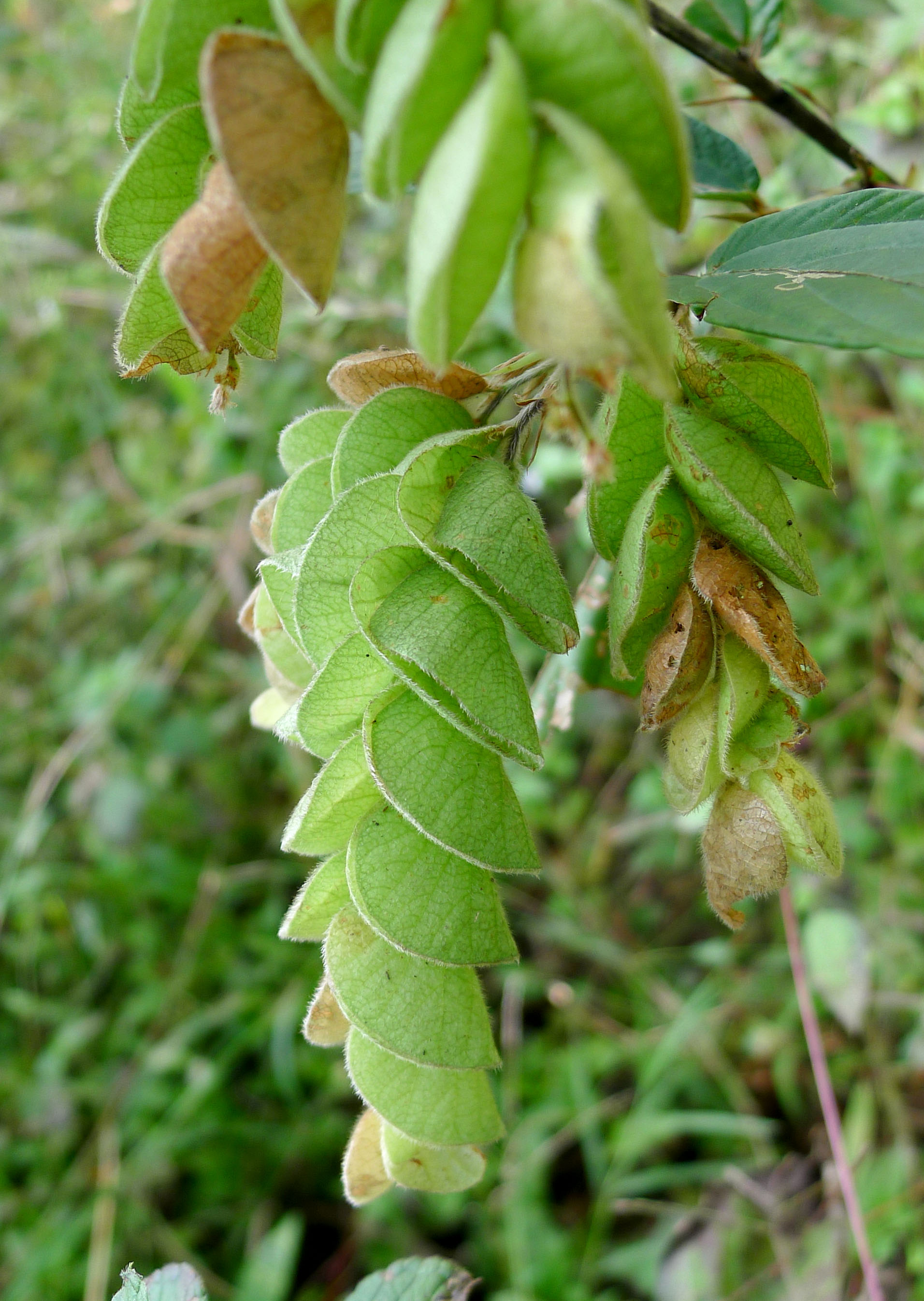 Luck plant .Flemingia strobilifera